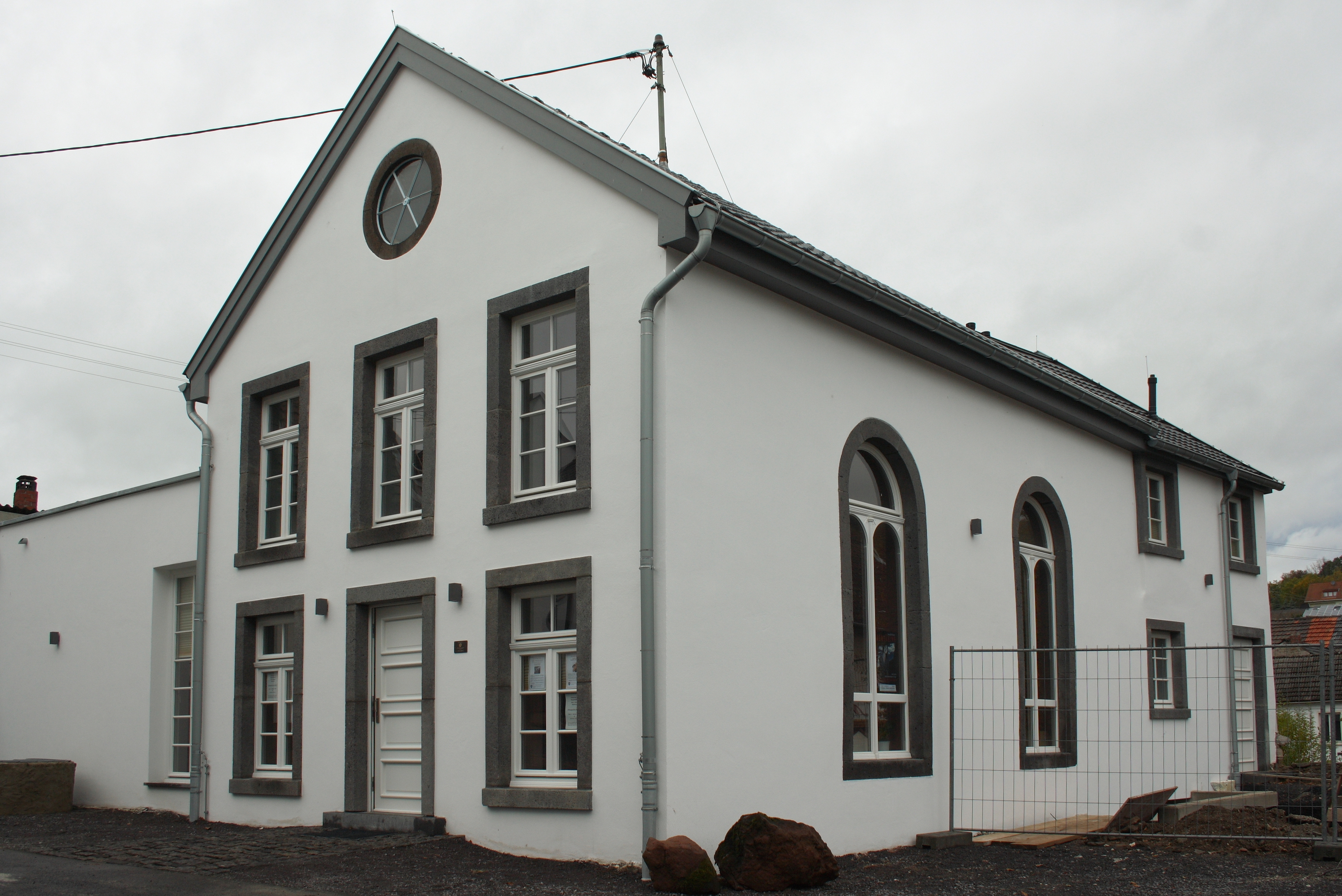 Ehemalige Synagoge in Niederzissen im Landkreis Ahrweiler (Rheinland-Pfalz), nach der Renovierung